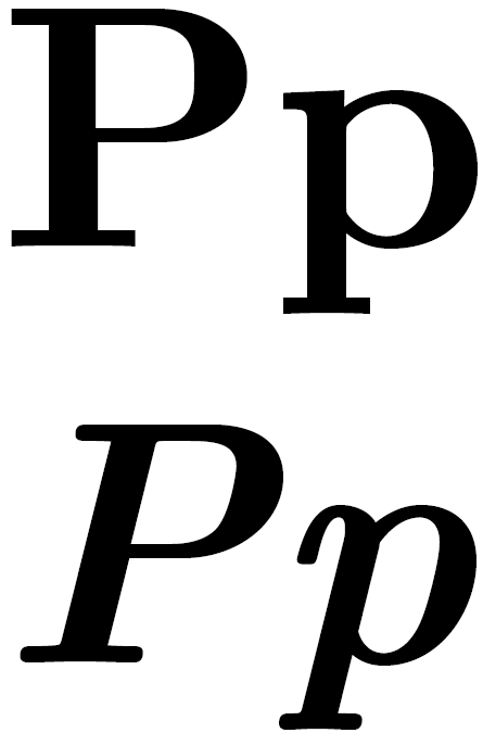 Latin letter P